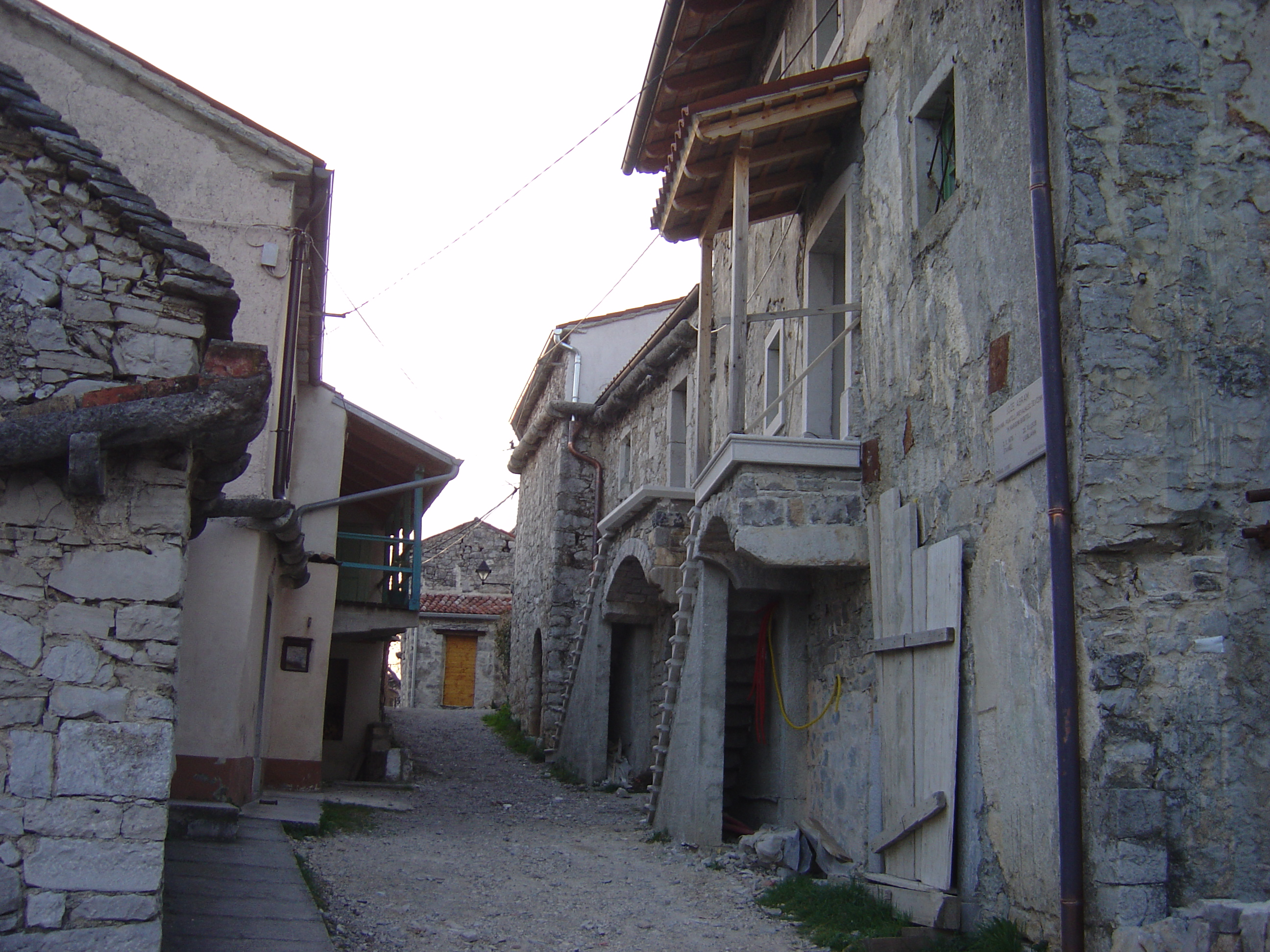 Štanjel, Komen, Slovenia